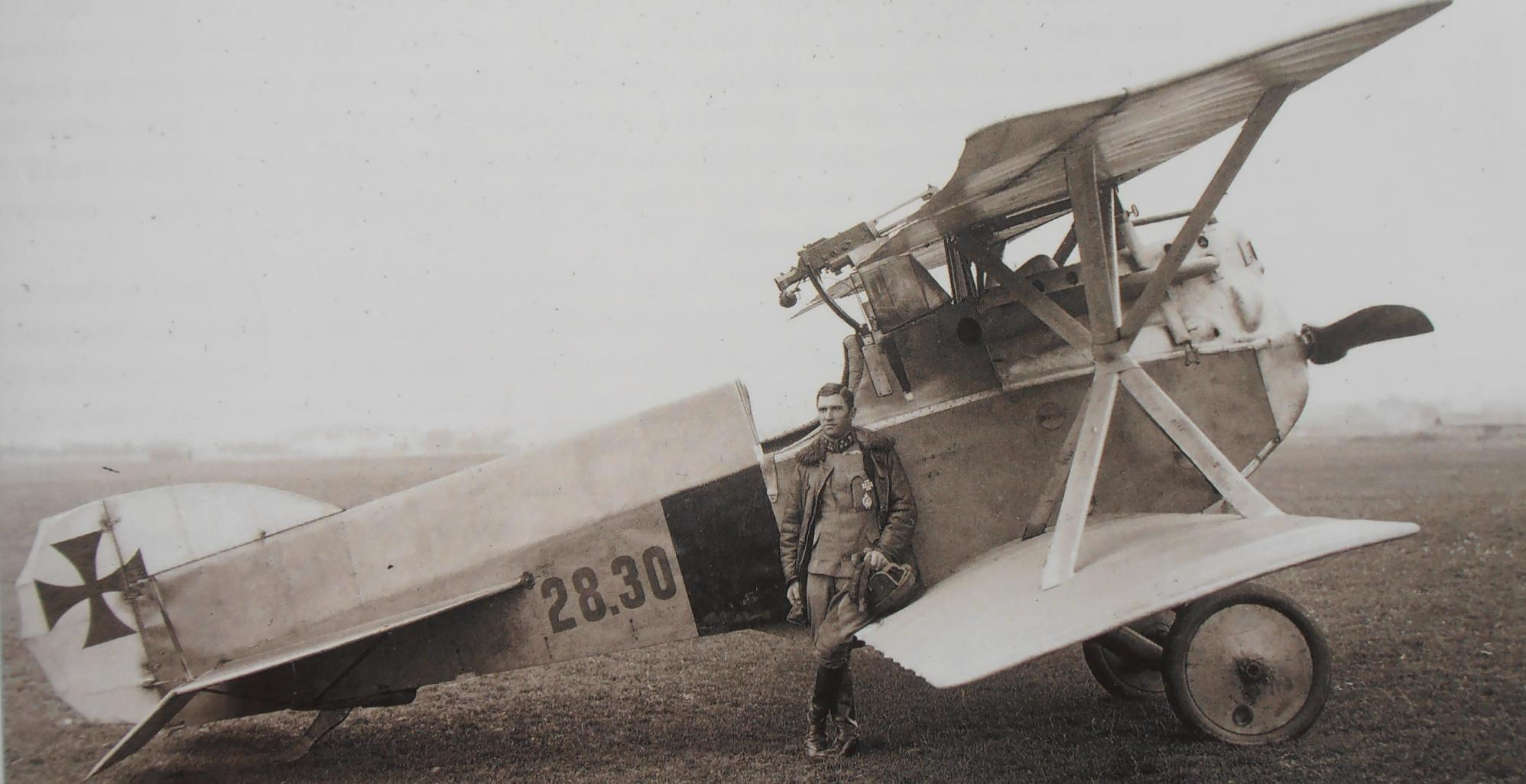 Raoul Stojsavljević első világháborús pilóta Hansa-Brandenburg D.I-es repülőgépével